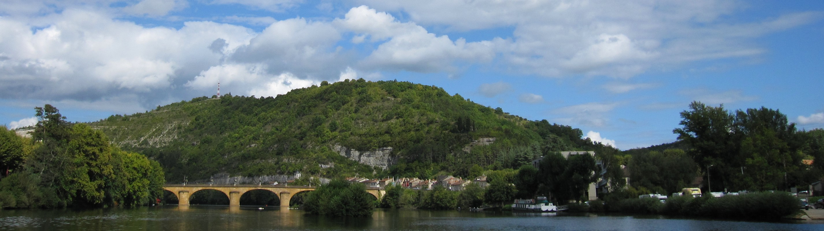 Vue panoramique de Cahors